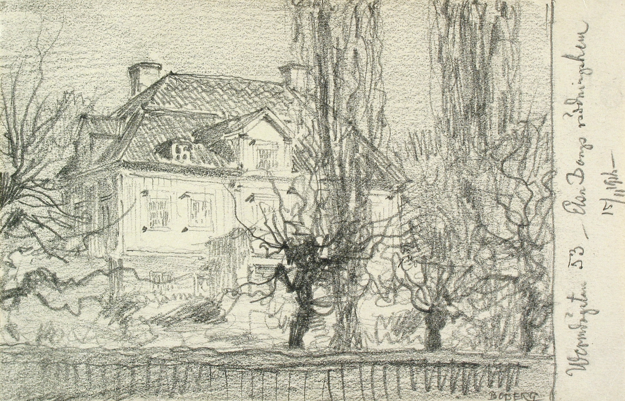 Groens malmgård, skiss av Ferdinand Boberg